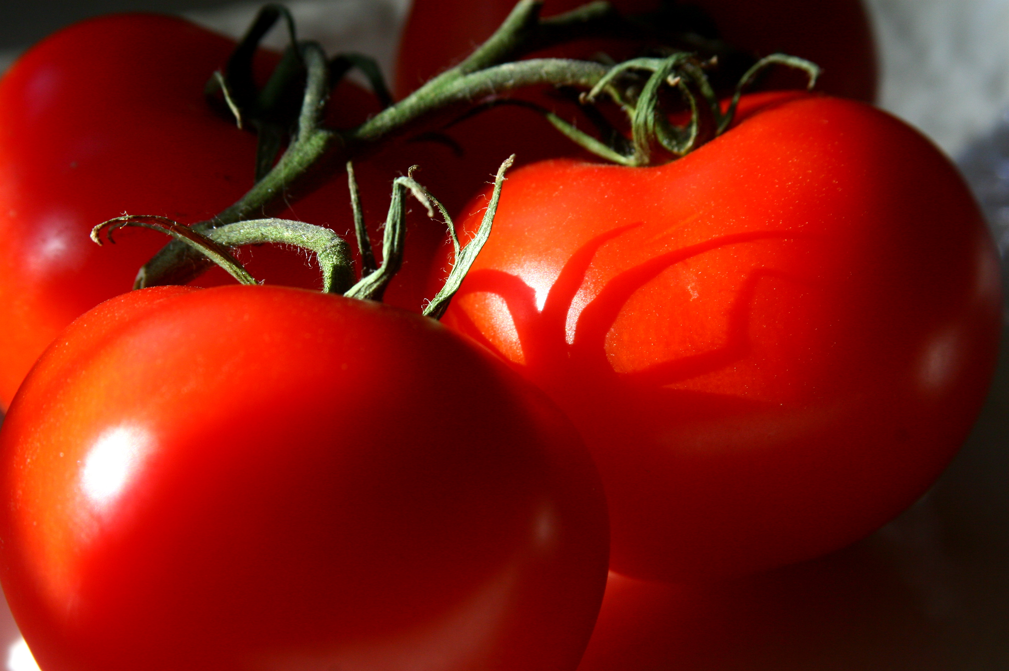 local tomatoes